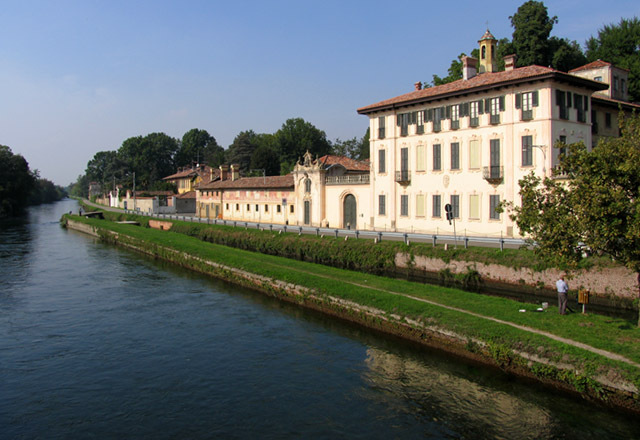 Villa - Cassinetta di Lugagnano 12/2006